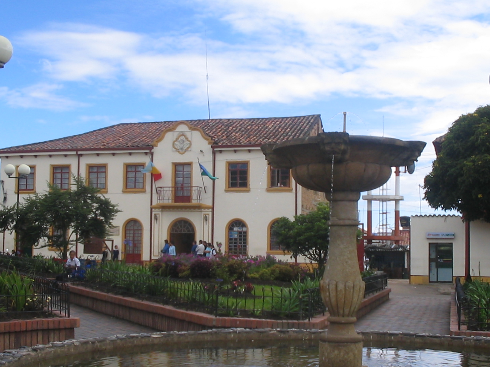 Fountain square in Cogua, Cundinamarca, Colombia